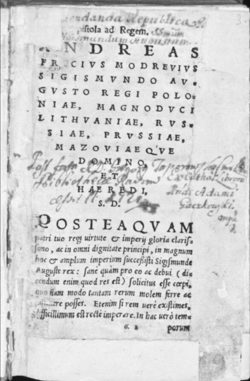 De Republica Emendanda - Biblioteka Narodowa w Warszawie strona 3. Skan ukazujący zniszczenia jedynego zachowanego egzemplarza B.N.